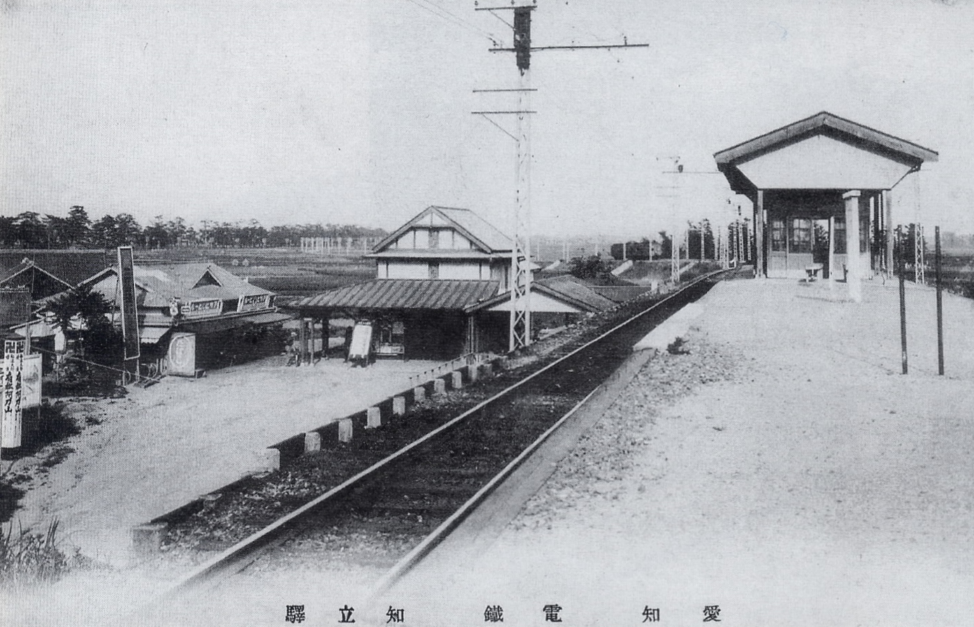 愛知電気鉄道時代の新知立駅